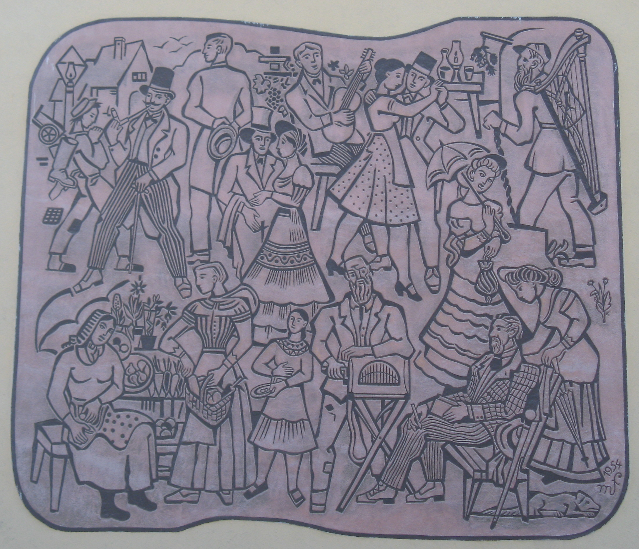 Sgraffito "Wiener Spaziergänge von Schlögl" (1954) von Maximilian Florian am Haus Schlöglgasse 17 in Wien-Meidling This media shows the Vienna residential building (Gemeindebau) with the ID 905.